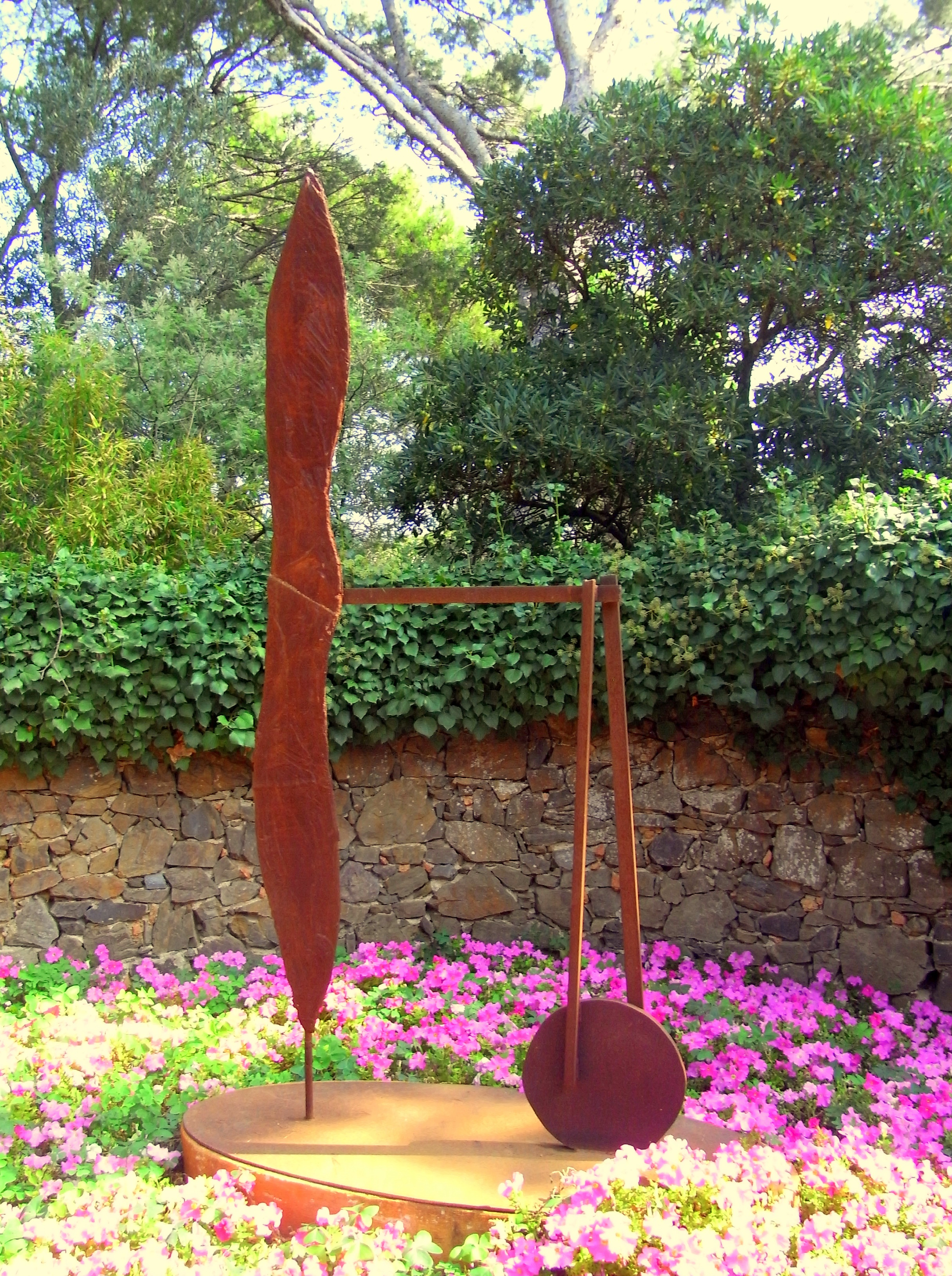 CALELLA de PALAFRUGELL - Jardins de cap Roig "L´HÈLIX de FERRO" (1991´1998) Josep Mª Riera i Aragó (Barcelona 1954) Ferro. 225 x 161,5 x 75 cm